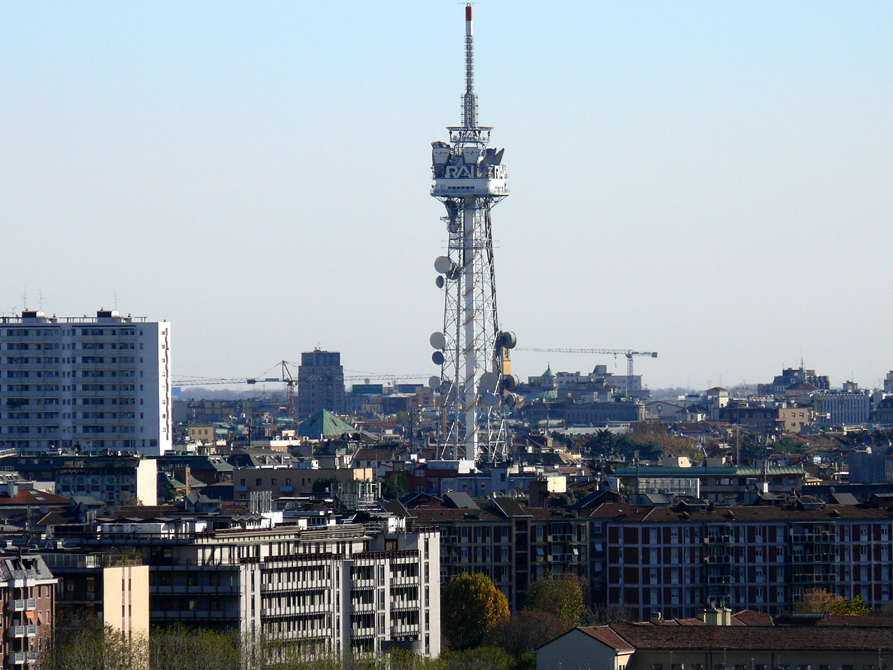 Rai antenne in Mailand